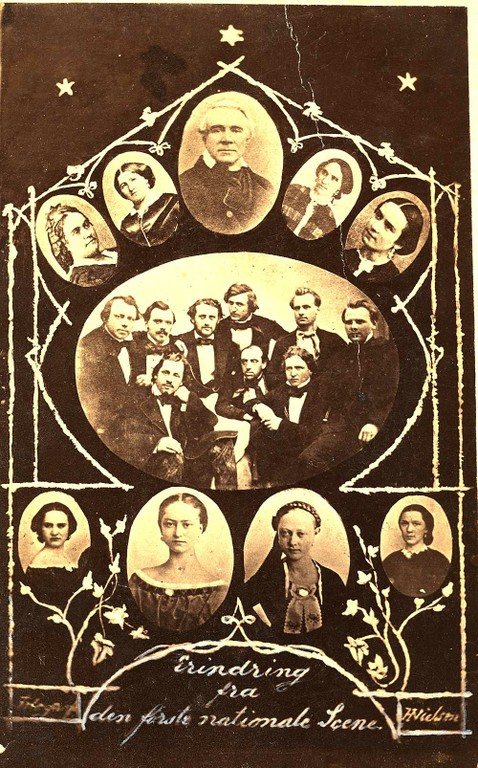 Norsk Folkeblad, 1899.